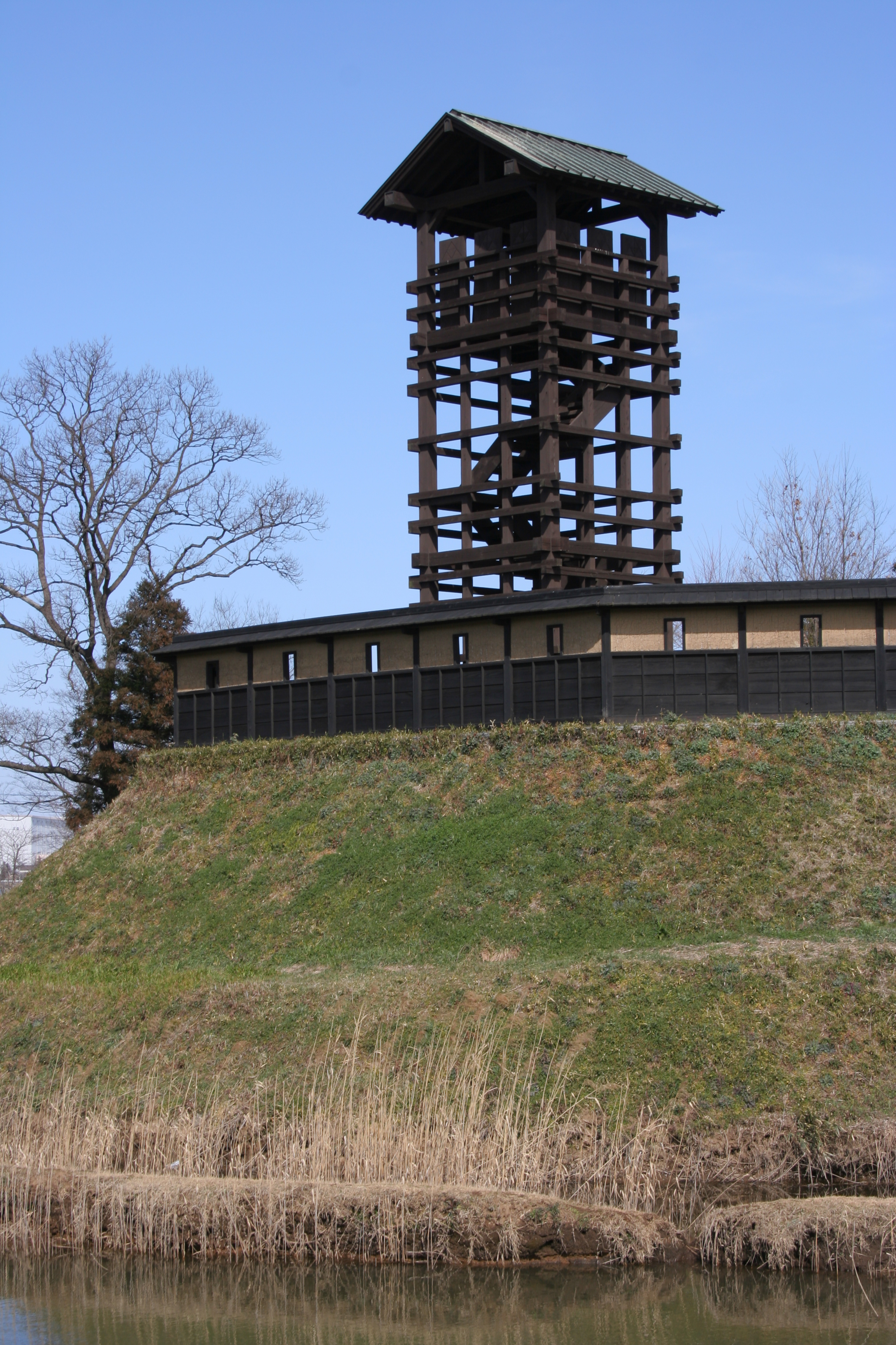 復元された逆井城の井楼矢倉